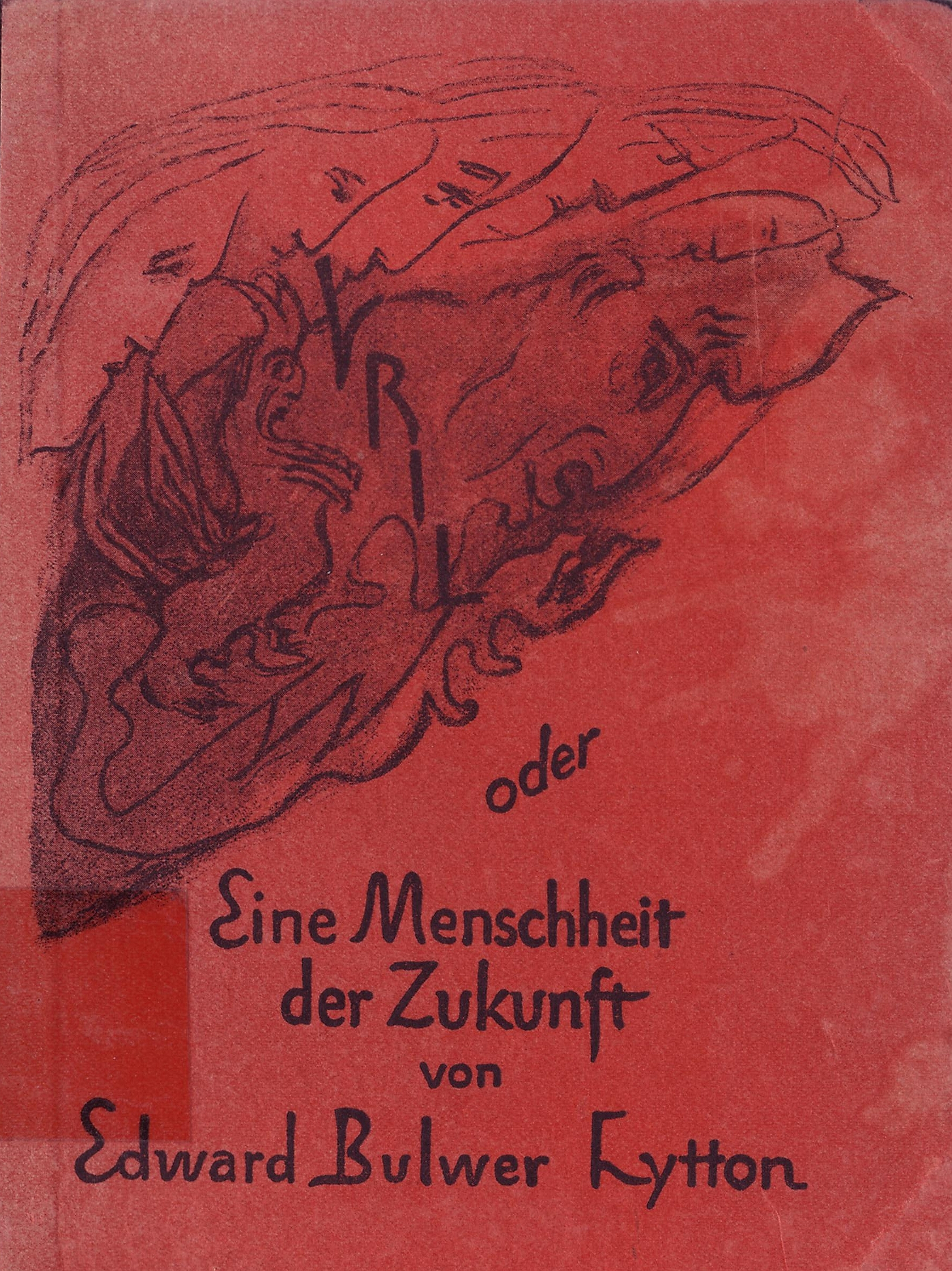 Bucheinband; Bulwer-Lytton: Vril oder Eine Menschheit der Zukunft. Stuttgart, 1922